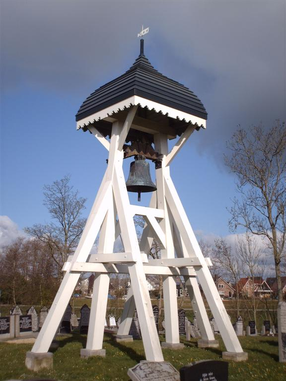 Klokkenstoel Nes (Boornsterhem)